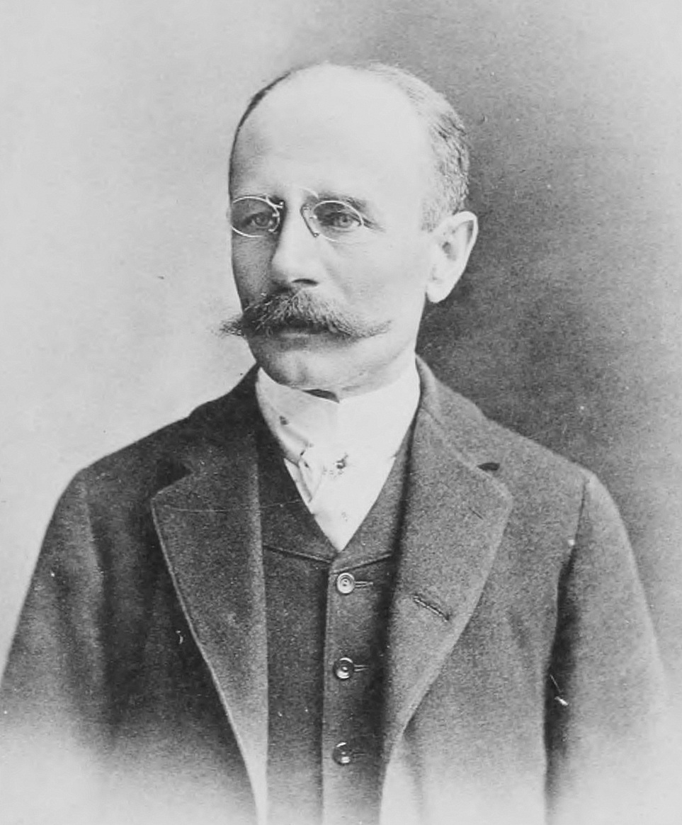 Tadeusz Czarkowski-Golejewski (1850-1945)